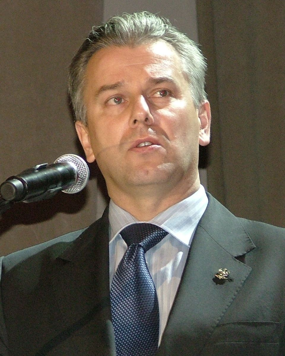 Cezary Grabarczyk